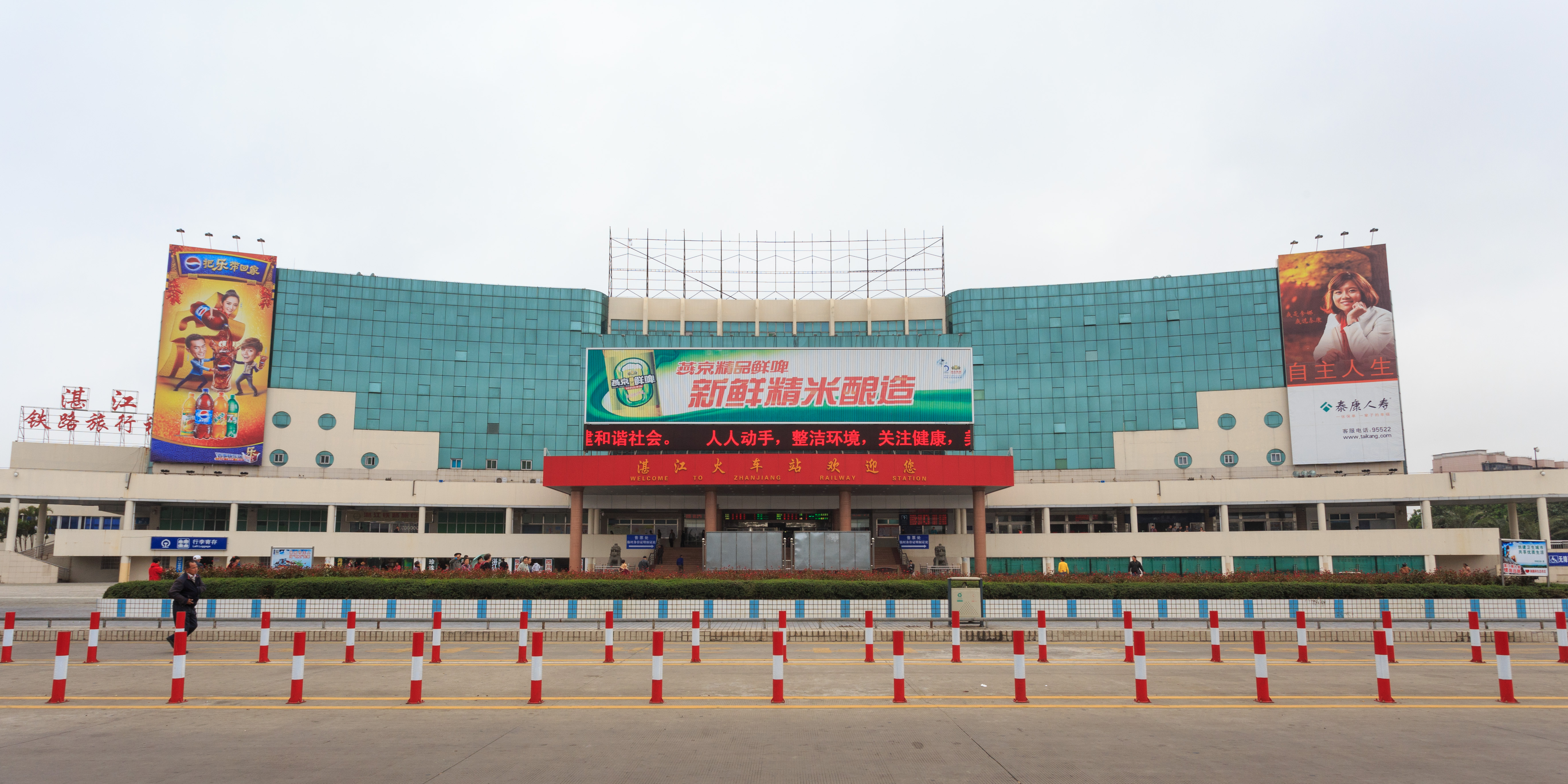 湛江站